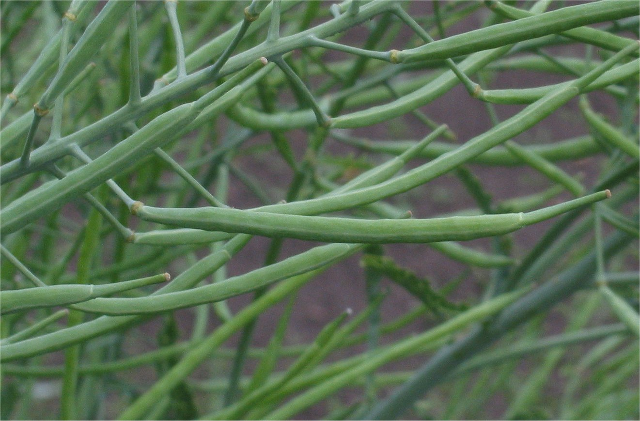 Fruits of Curly Kale (Boerenkool hauw met snavel)